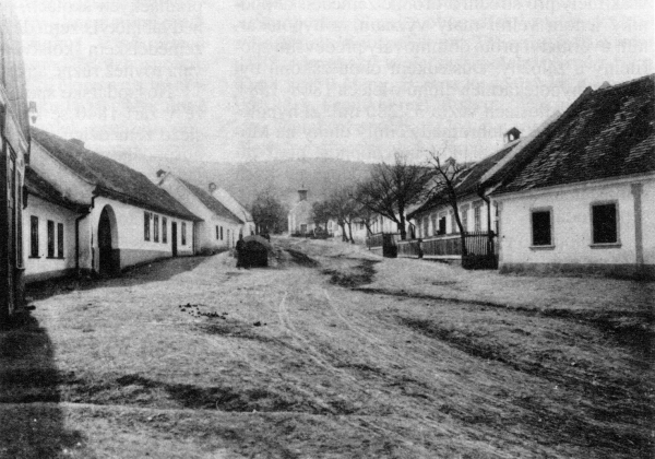 Náves v Brně-Jundrově (dnes ulice Nálepkova), v pozadí kaple sv. Josefa